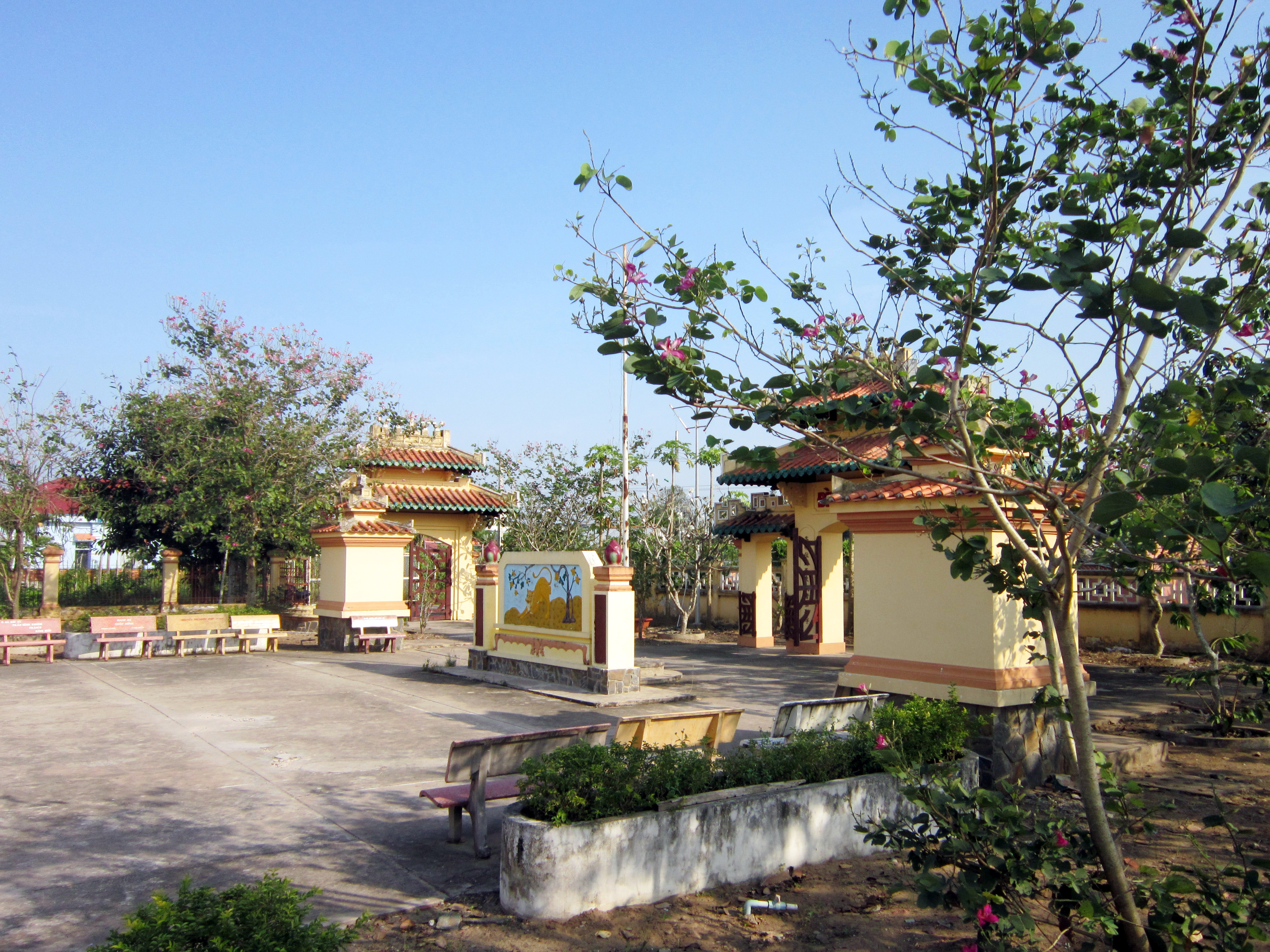 Ảnh sân đình Tân Hoa. Ngôi đình ở ấp Tân Hưng, xã Tân Hòa, thành phố Vĩnh Long, tỉnh Vĩnh long. Đây là di tích "lịch sử-văn hóa" cấp quốc gia Việt Nam.